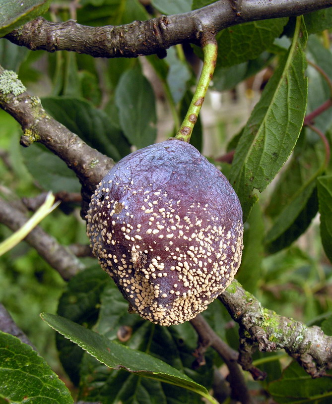 Slyvinė monilija (Monilia laxa) Foto: Algirdas, 2006 m. rugpjūčio 24 d., Lietuva